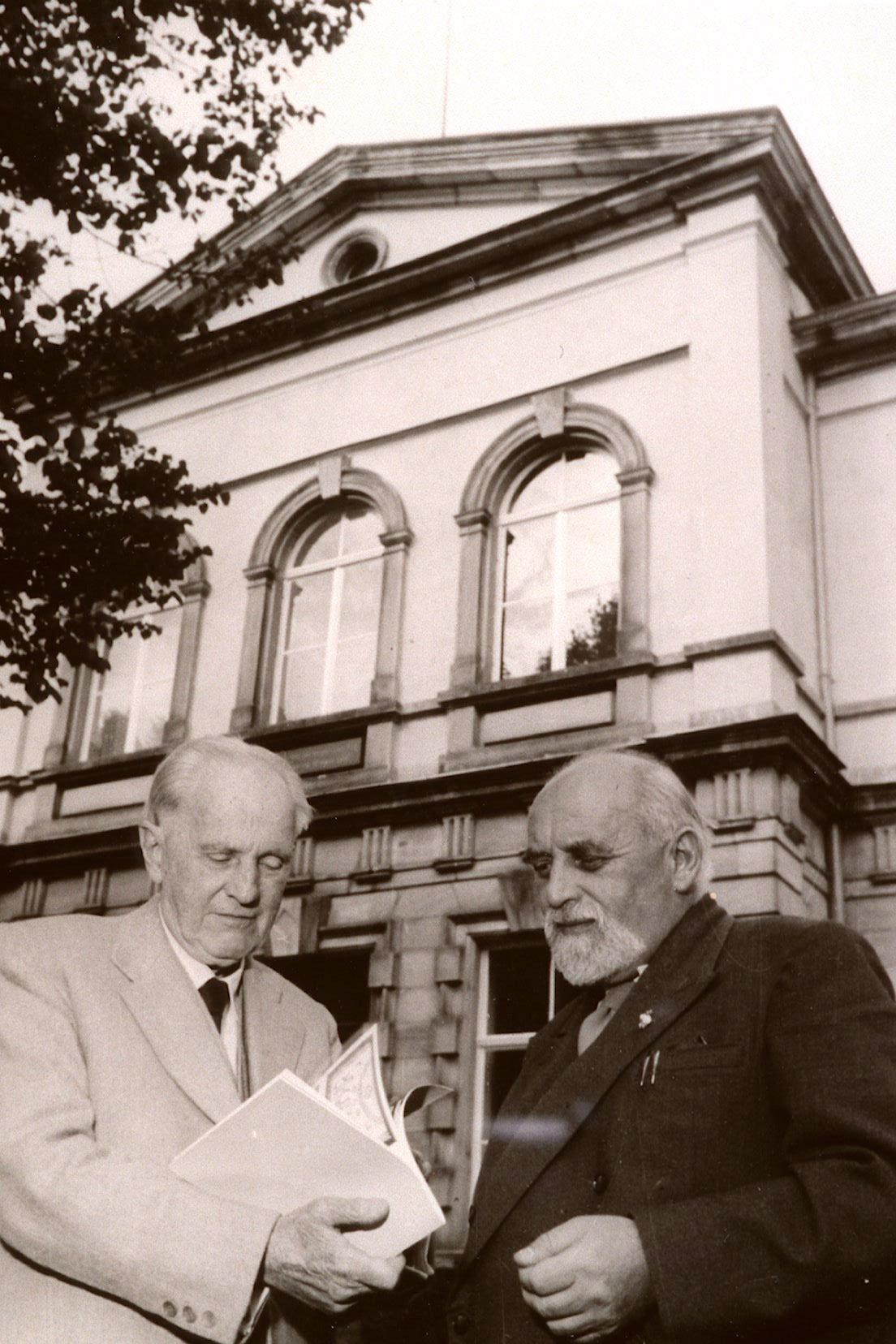 Das Originalbild Beyer/Vogel liegt im Museumsarchiv des Deutschen Freimaurer-Museums in Bayreuth.